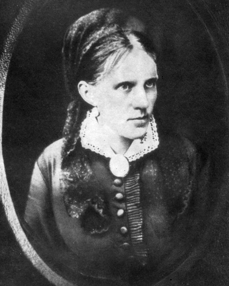 Anna Dostoyevskaya.